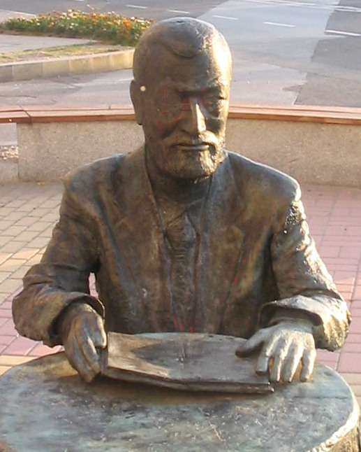 Estatua de Manuel María do escultor José Antonio Ferrer Diéguez (Ourense, 1970) en Monforte de Lemos, inaugurada o 3 de agosto de 2006.